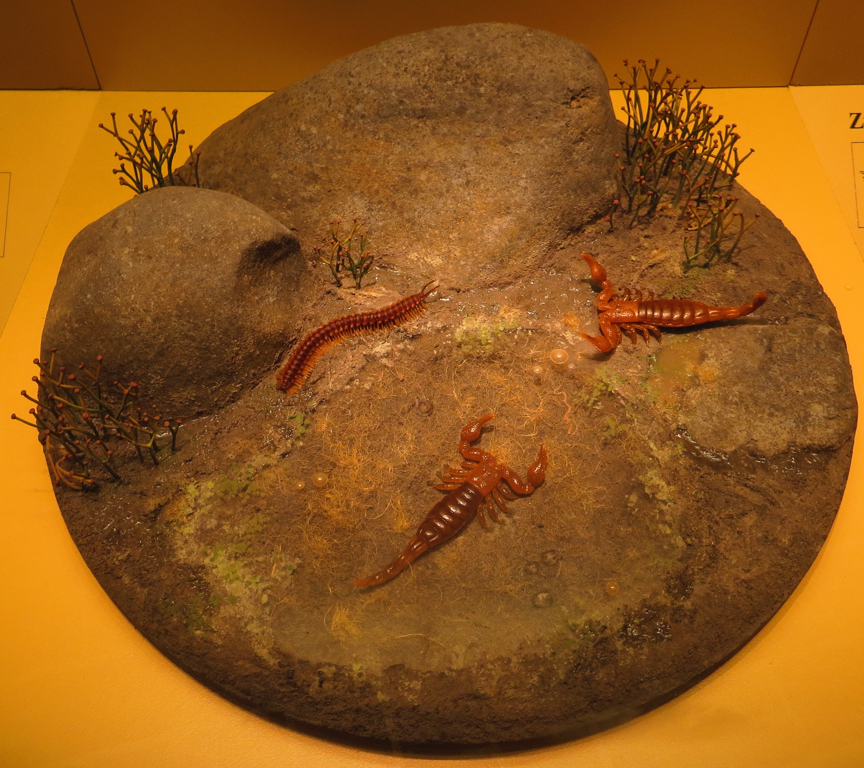 Took the picture at Museum Mensch und Natur, Munchen